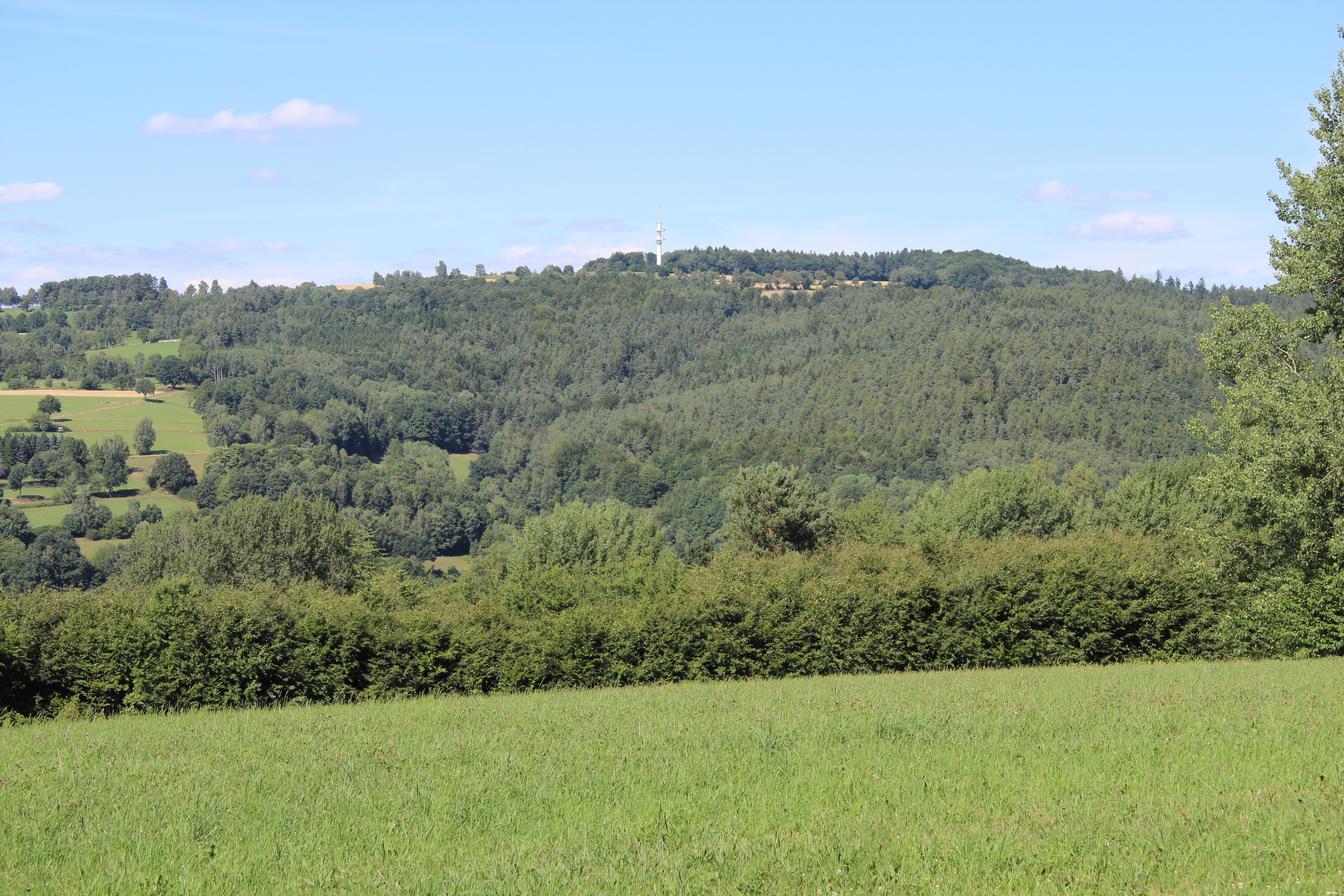 Blick vom Horstberg zwischen Gichenbach und Hettenhausen zum Heidküppel, Milseburger Kuppenrhön, Landkreis Fulda, Hessen